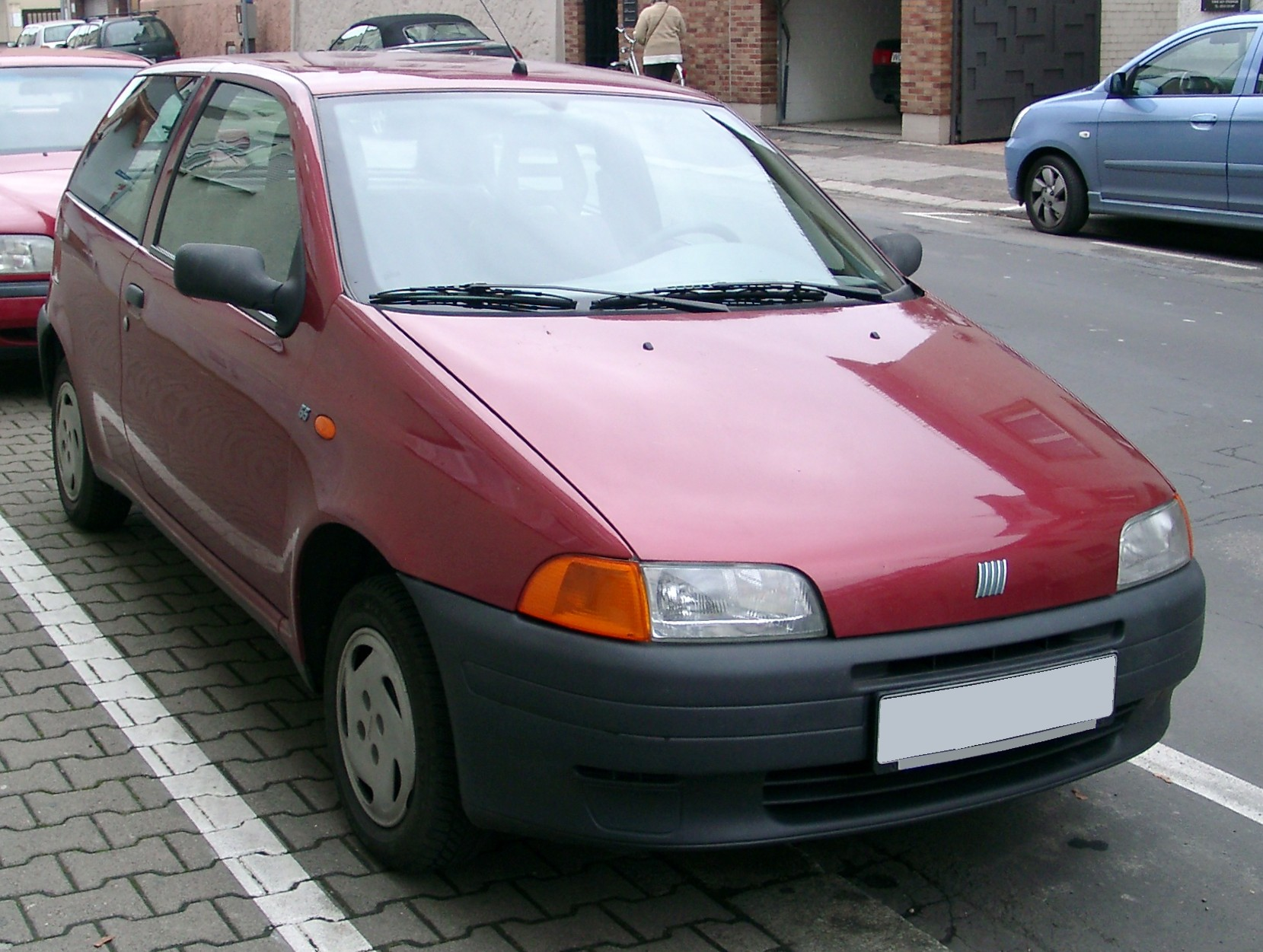 Fiat Punto, 1. Generation